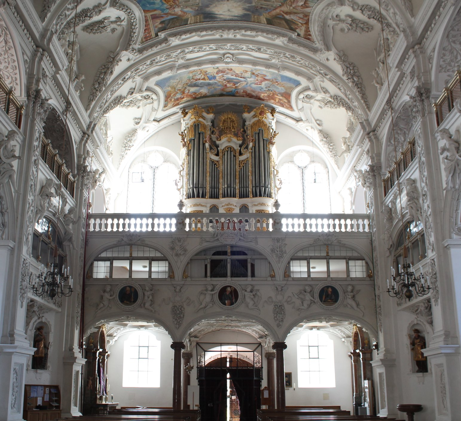 Orgel von St. Benedikt in Benediktbeuern